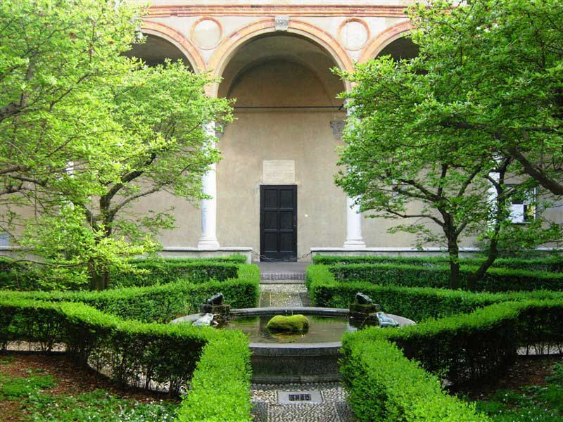 Српски (ћирилица): Двориште мртвих